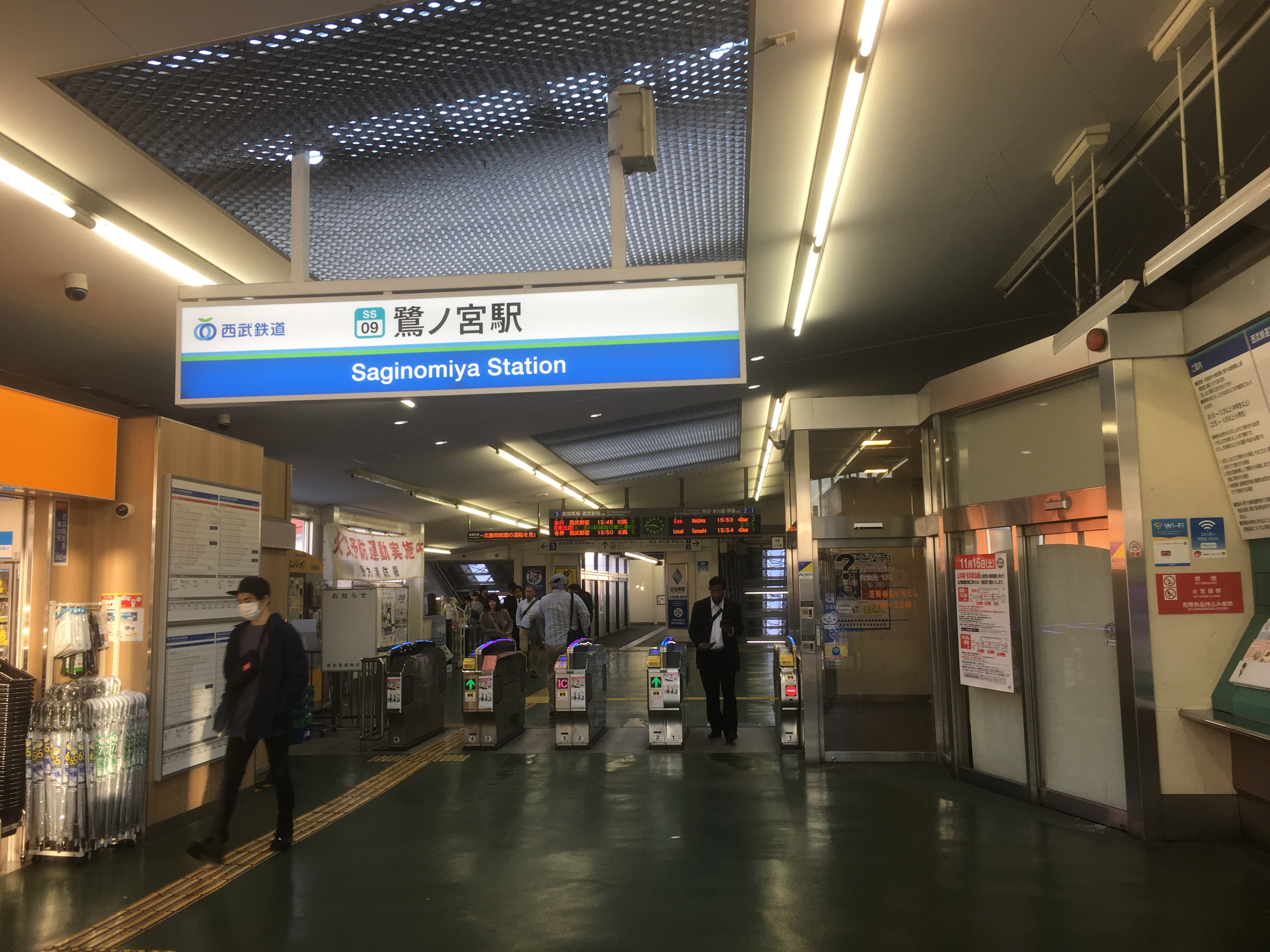 鷺ノ宮駅 (Saginomiya Station)